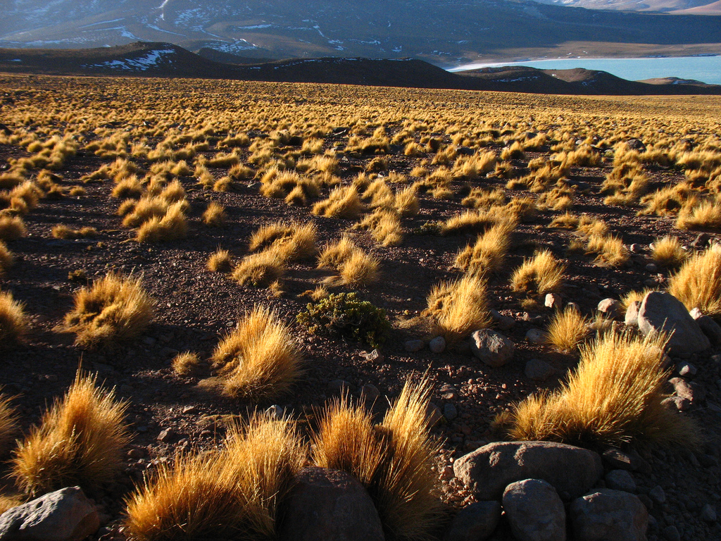 Stipa ichu (synonym Jarava ichu)